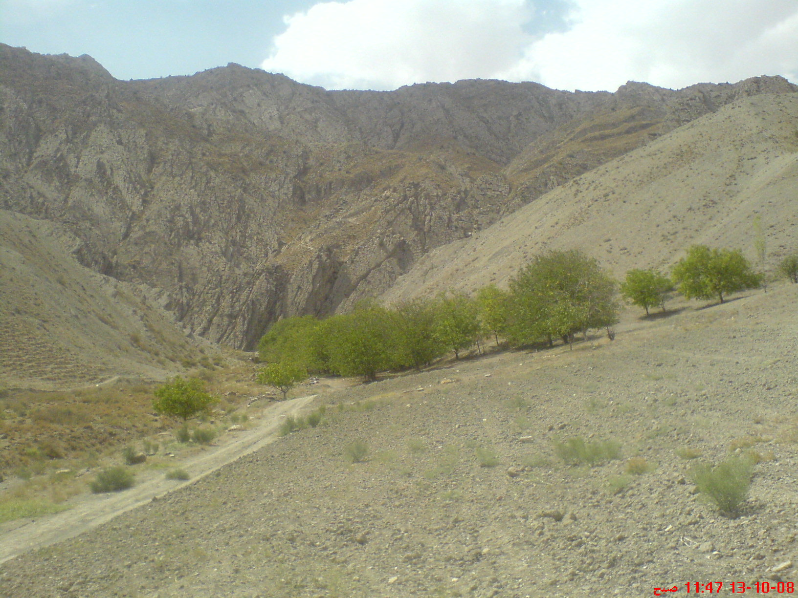 خماری:احسان عابدین:تابستان 87